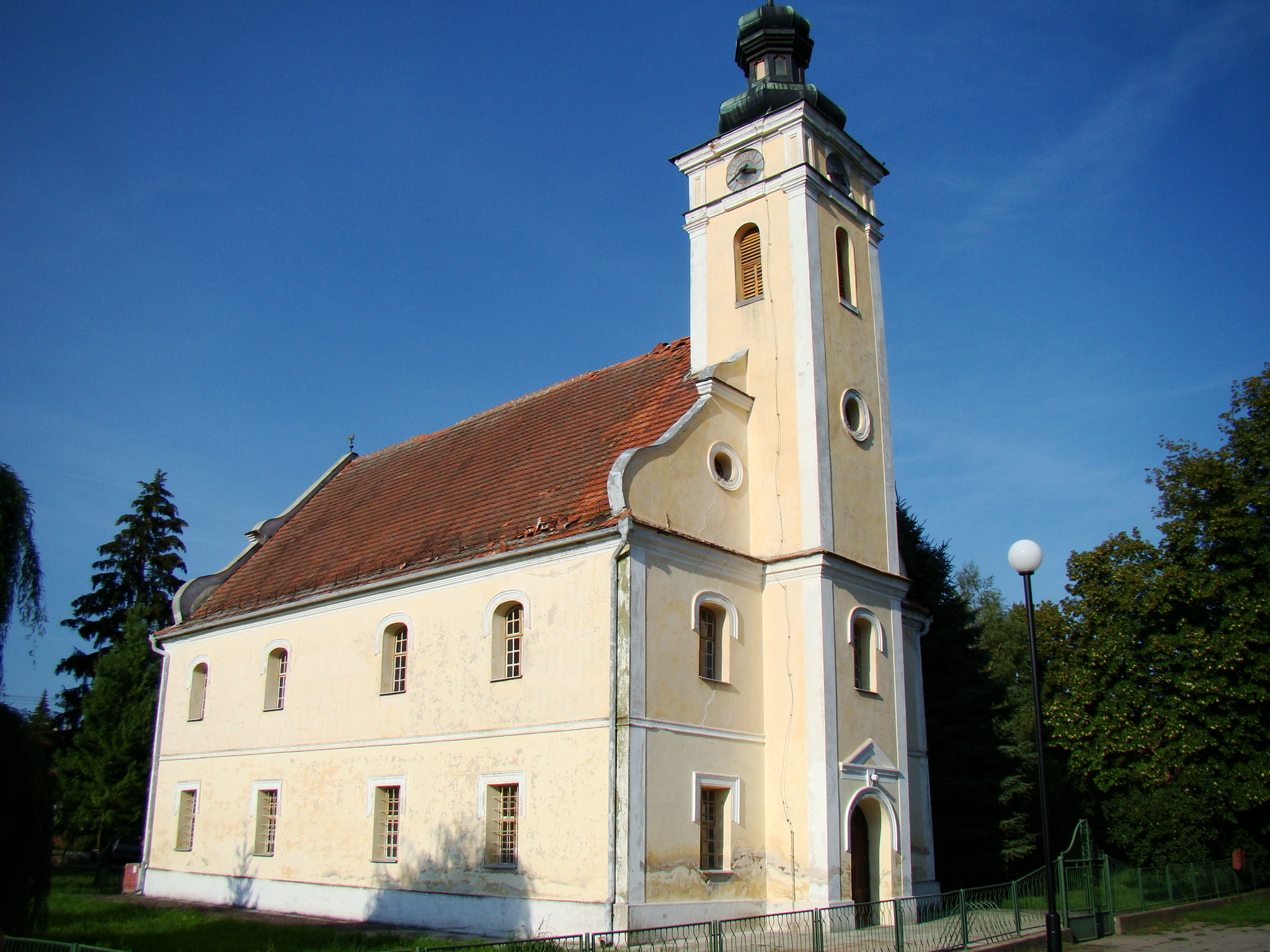 church